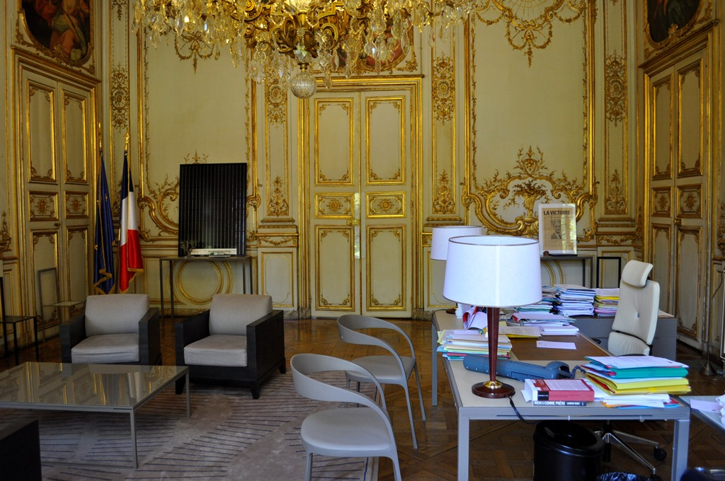 Bureau de l'hôtel de Roquelaure L'hôtel de Roquelaure est situé au 246, boulevard Saint-Germain, dans le septième arrondissement de Paris. Cet immeuble était traditionnellement affecté au ministère de l'Equipement avant de devenir le siège du cabinet du ministère de l'Ecologie et du Développement Durable. En 2012, ce bureau est celui de la ministre, Delphine Batho. Photo prise lors des journées européennes du patrimoine 2012